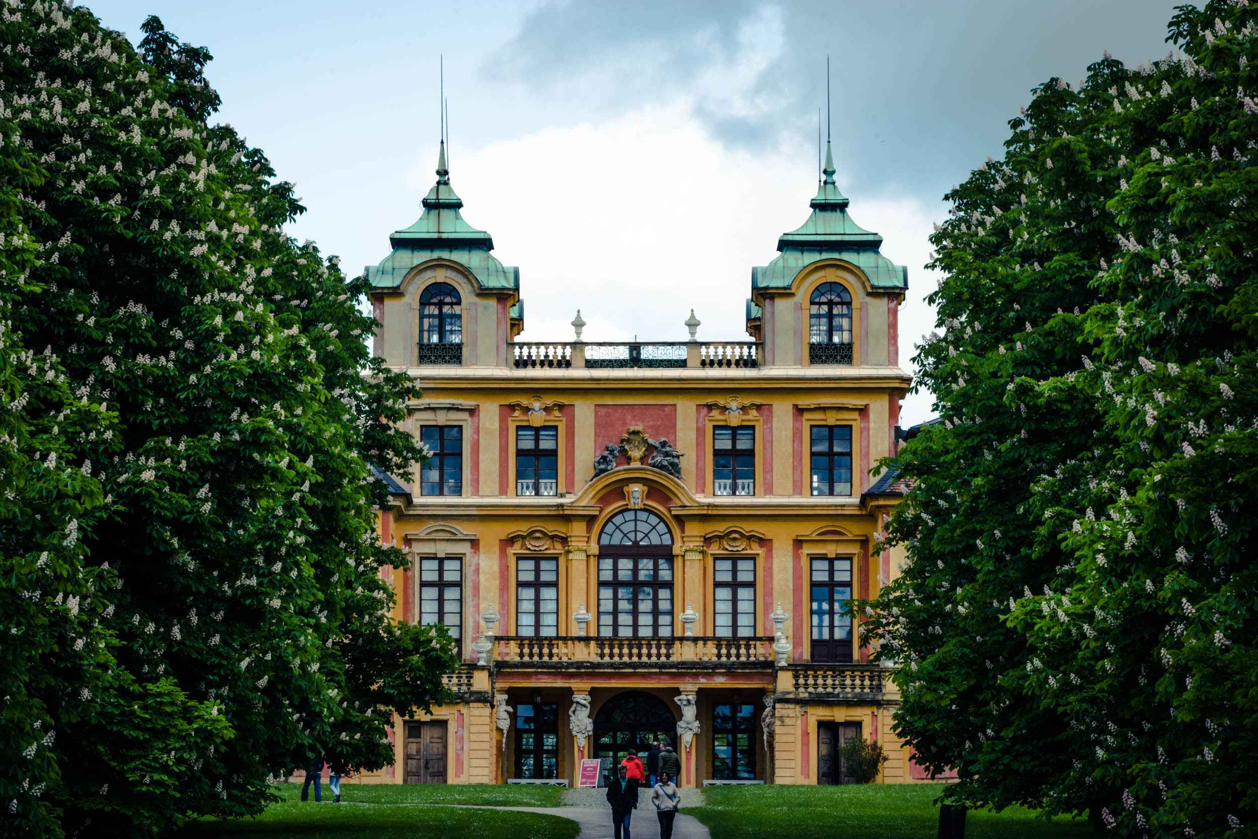 Schloss Favorite ist ein barockes Lust- und Jagdschlösschen in Ludwigsburg in Baden-Württemberg.